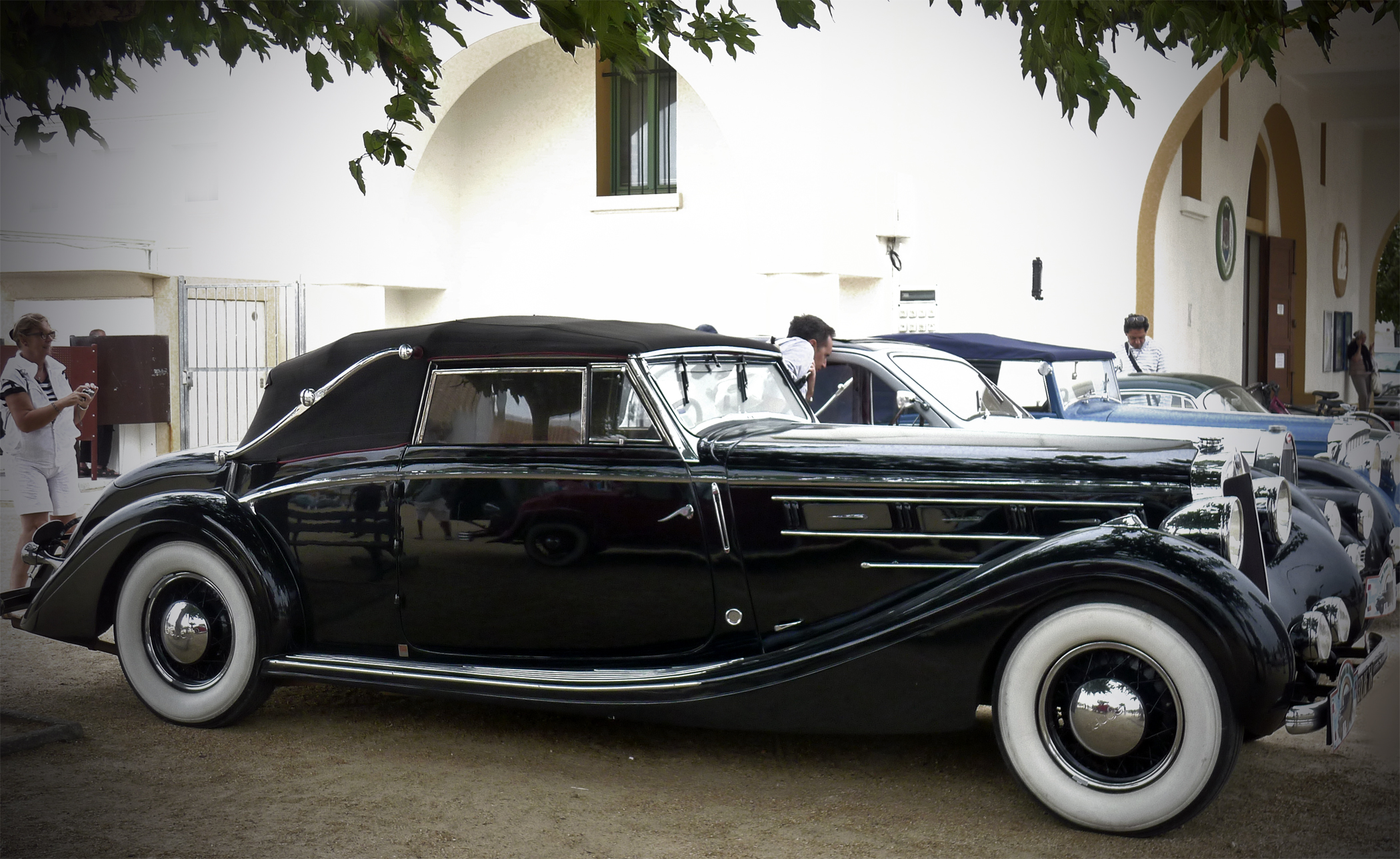 Delage (modèle D6)